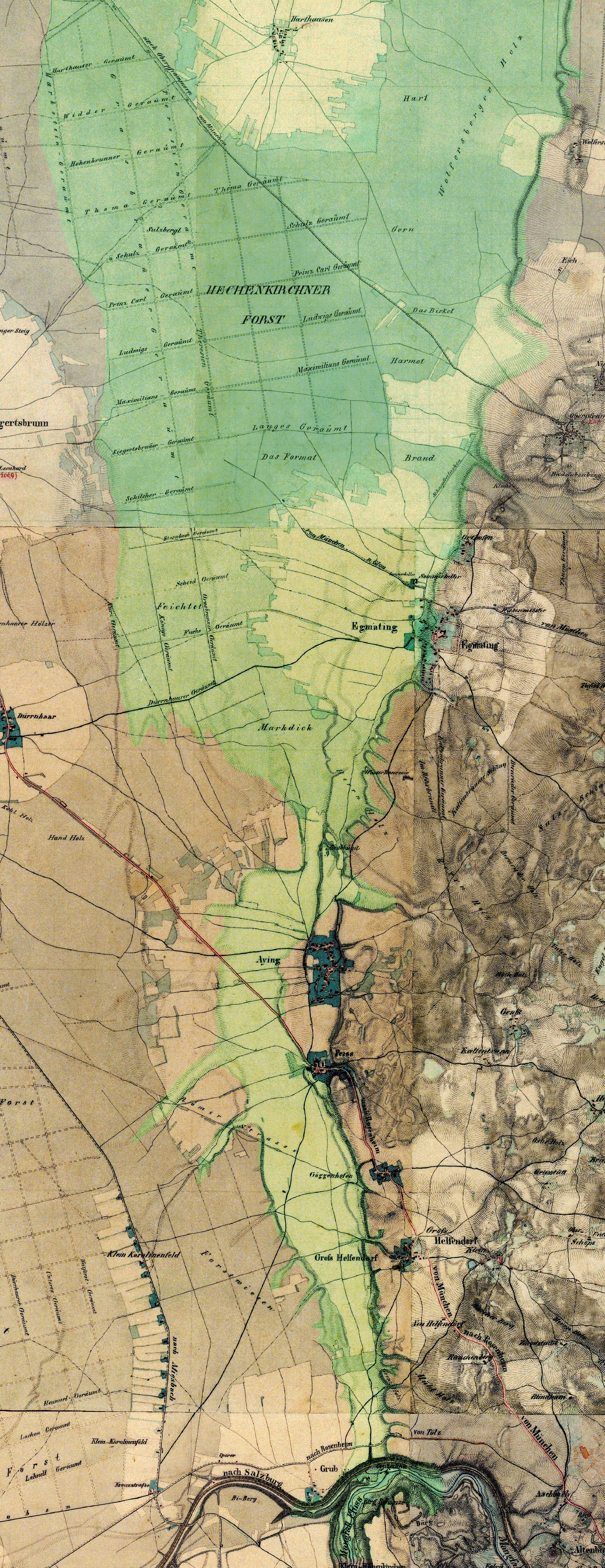 Verlauf des Grub-Harthausener Trockentals auf Basis einer historischen Karte von 1875-1877, Bearbeitung eigene Arbeit